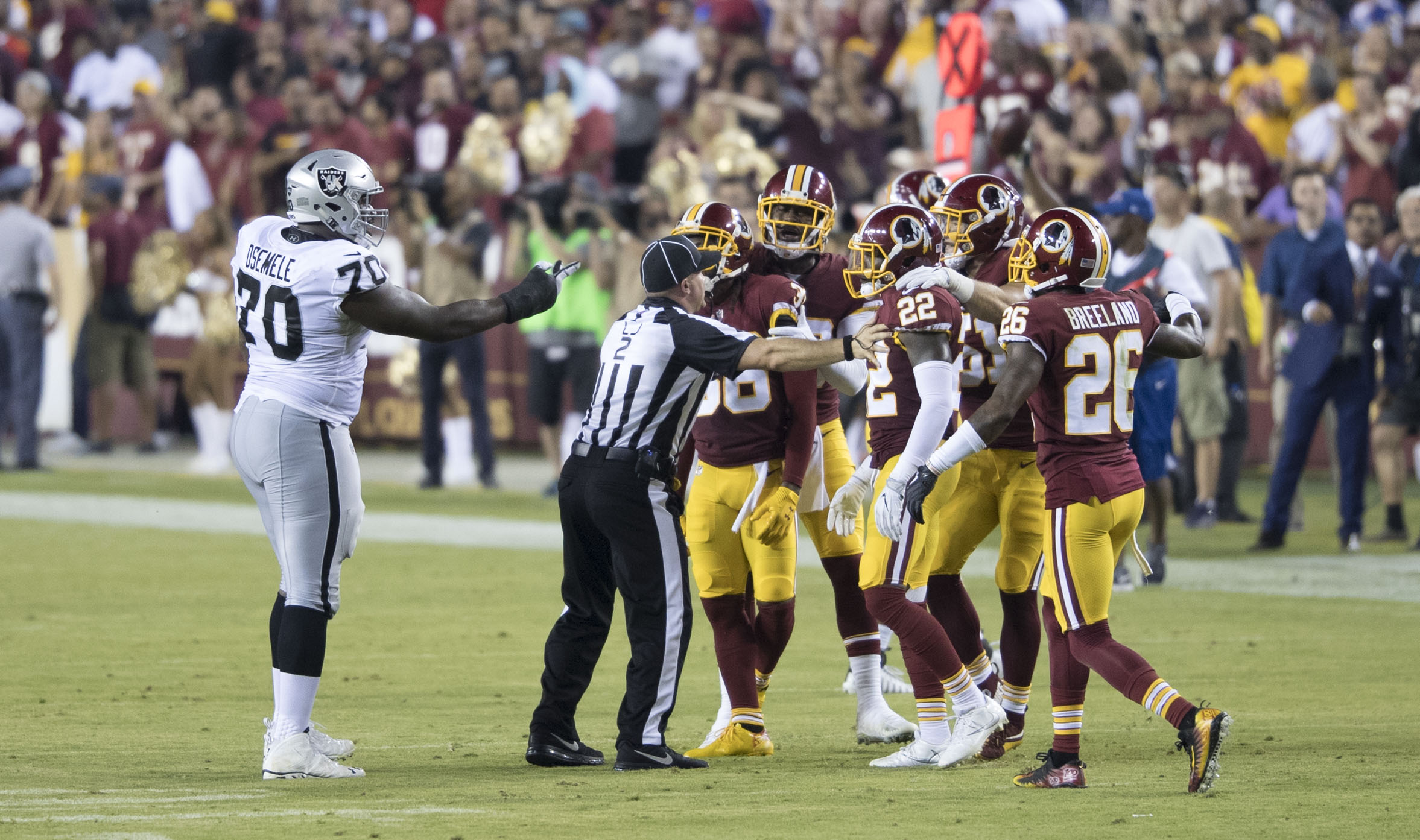 Raiders at Redskins 9/24/17